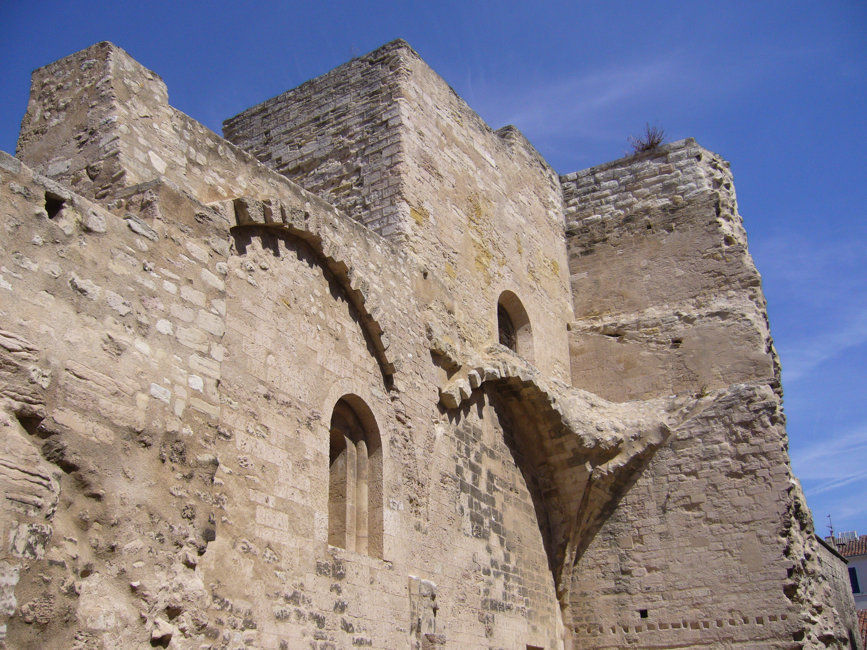 Revers de l’Abbaye Saint Victor à Marseille